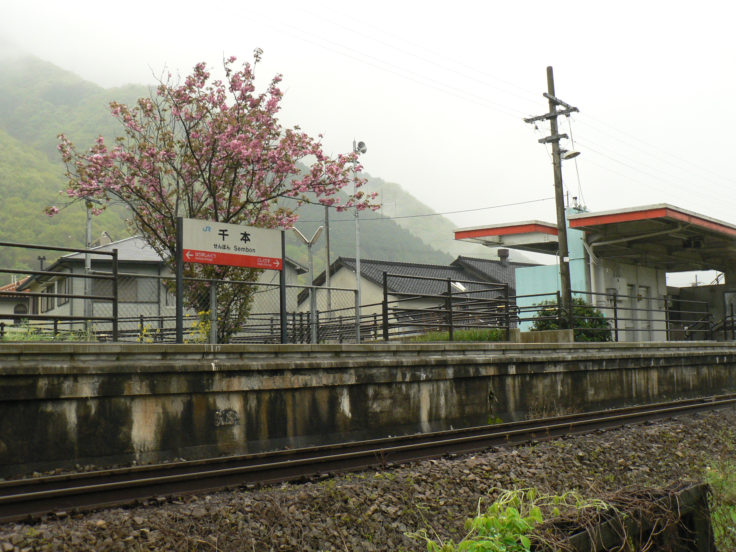 千本駅の駅構内。2012年4月撮影。